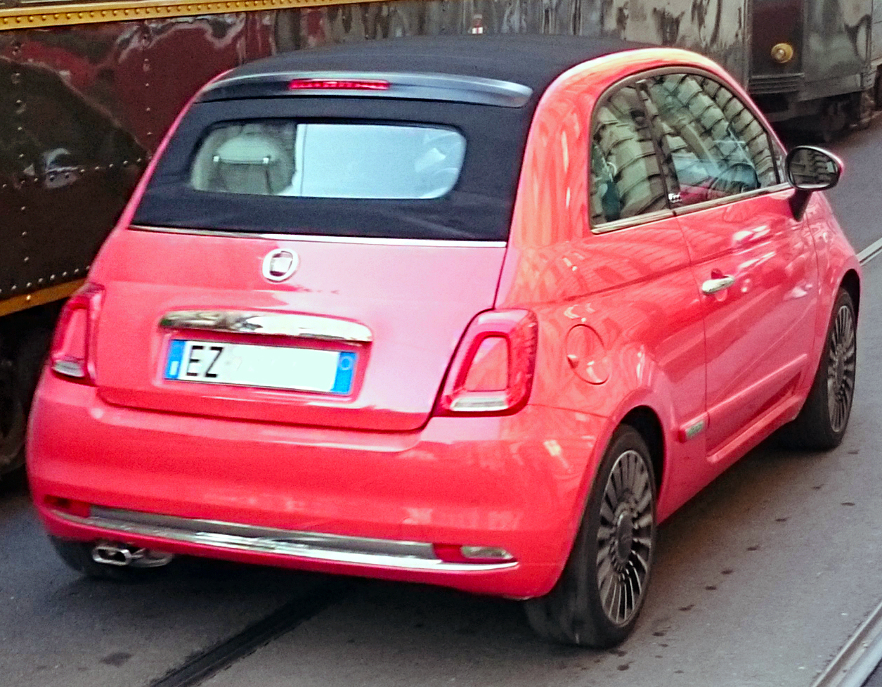 Una Fiat 500C del 2015 a Milano di fianco a due tram storici ATMosfera